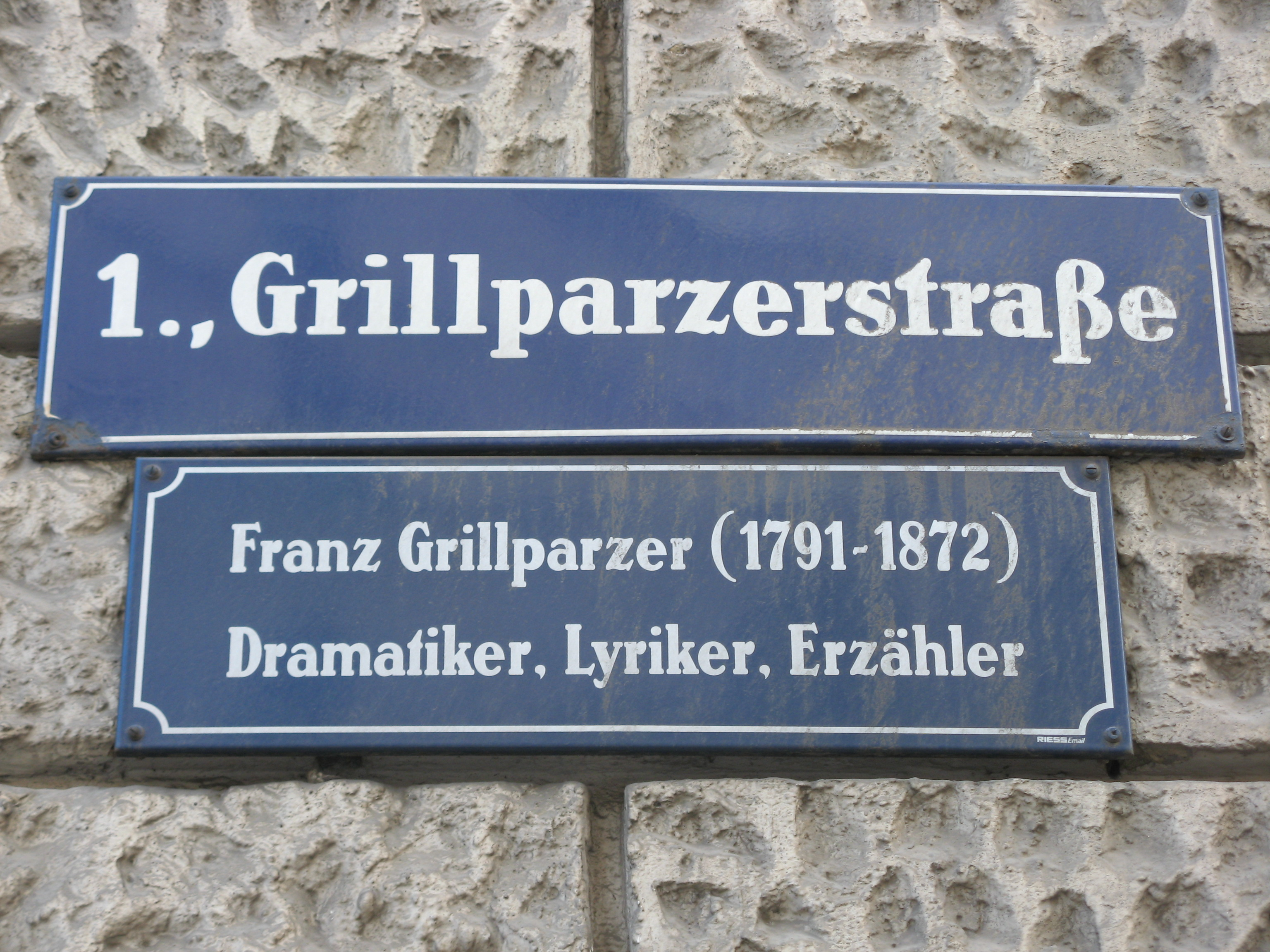 Straßentafel, Grillparzerstraße, Wien-Innere Stadt